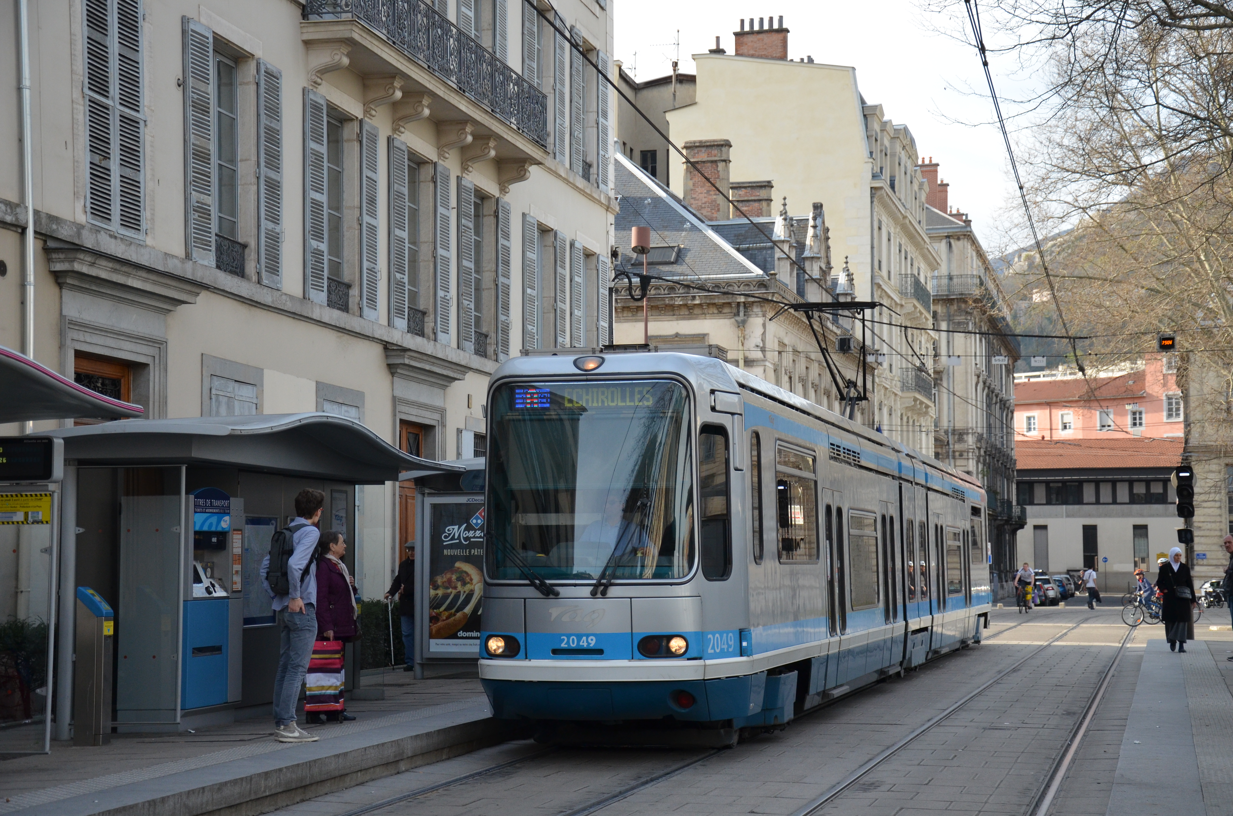 Tramway Alsthom TFS n°2049 du réseau TAG de Grenoble à la station Verdun-Préfecture, sur la ligne A.